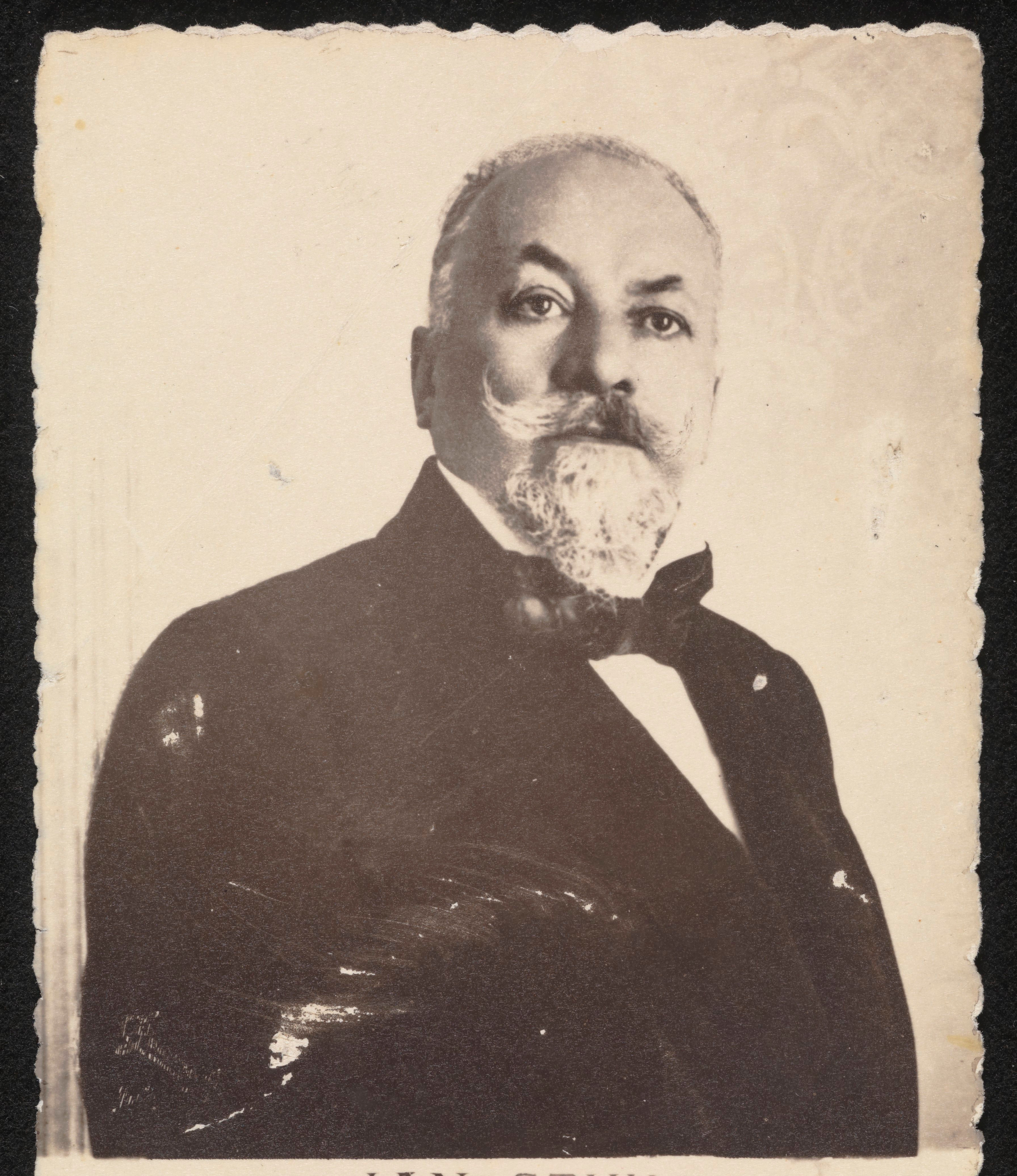 Malarz Jan Styka, pocztówka wyd. po 1905 r.